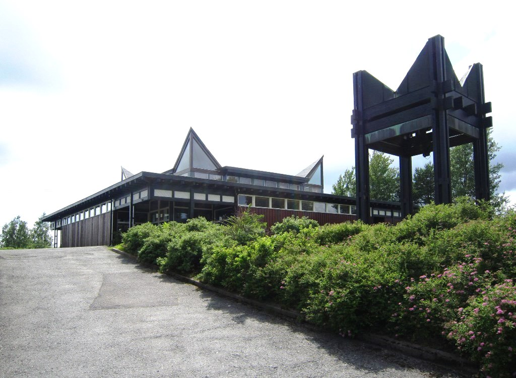 Greåker kirke i Sarpsborg